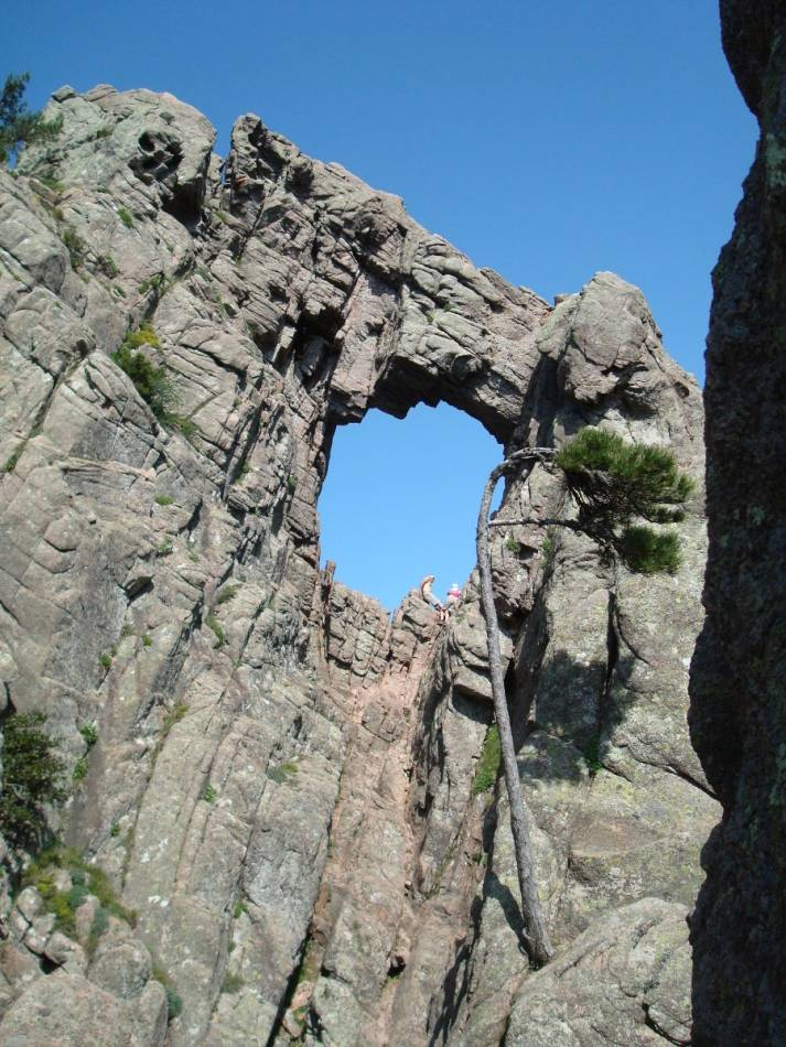 Auguilles dec Bavella - Le trou de la bombe